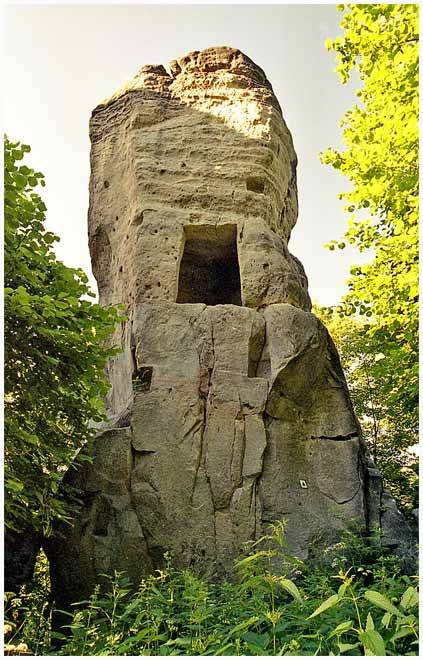 Zřícenina hradu Skály u Teplic nad Metují - skalní věž s vytesanou komorou, District Náchod autor:Prazak